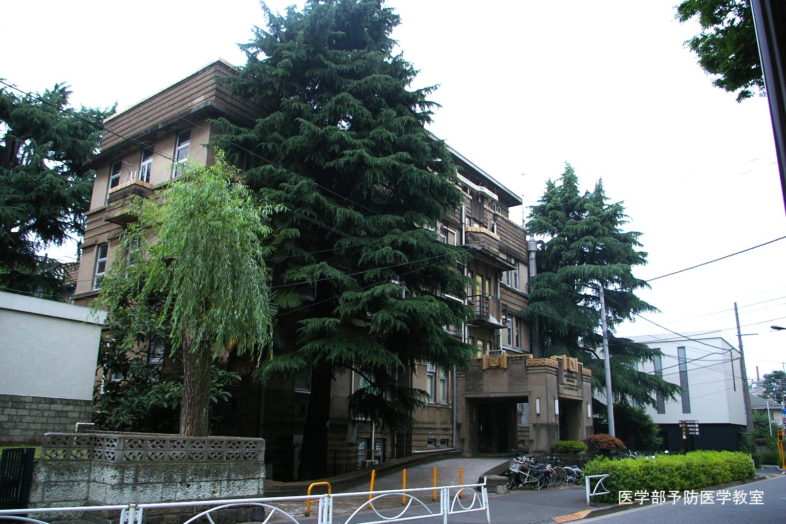 東京都内で自身で撮影